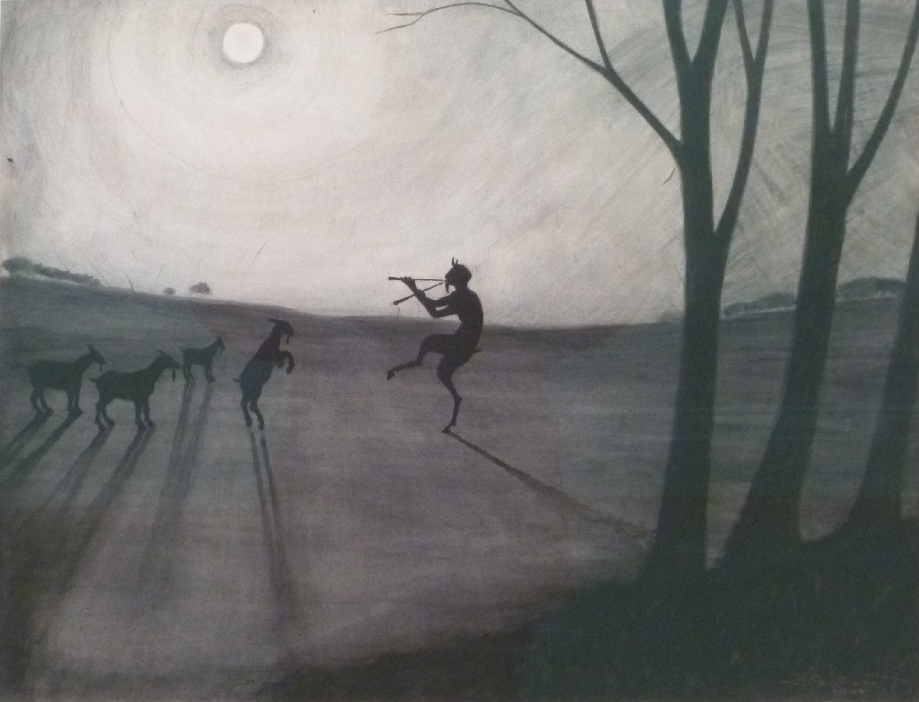 "Faun bij maneschijn" (1900); gewassen Oost-Indische inkt, penseel, zwart krijt, kleurpotlood op papier (49 x 63 cm) door de Belgische kunstschilder Léon Spilliaert (1881-1946); privéverzameling